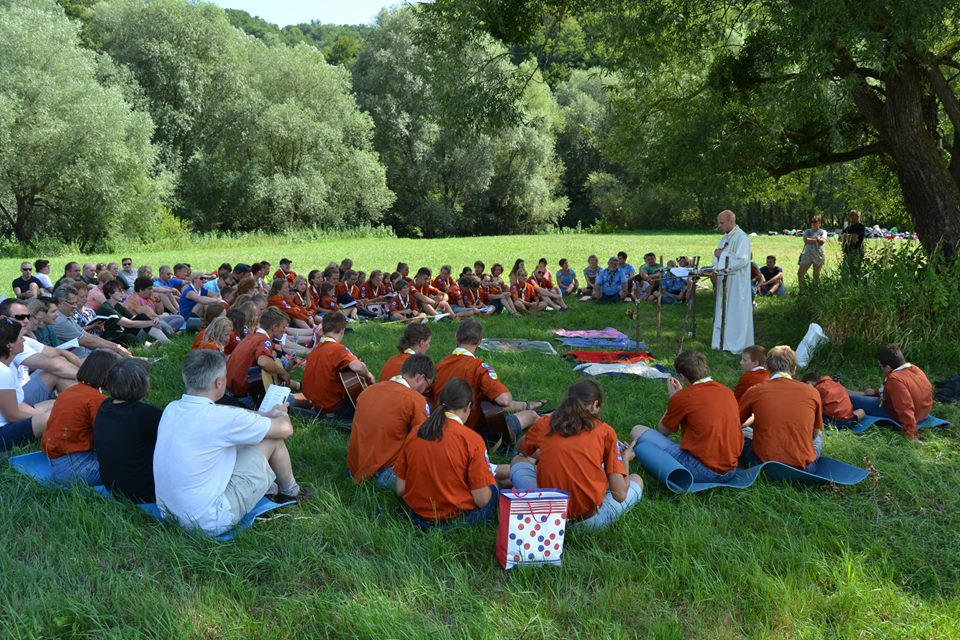 ZSKSS skavtski tabor stega Slovenske Konjice1 2017